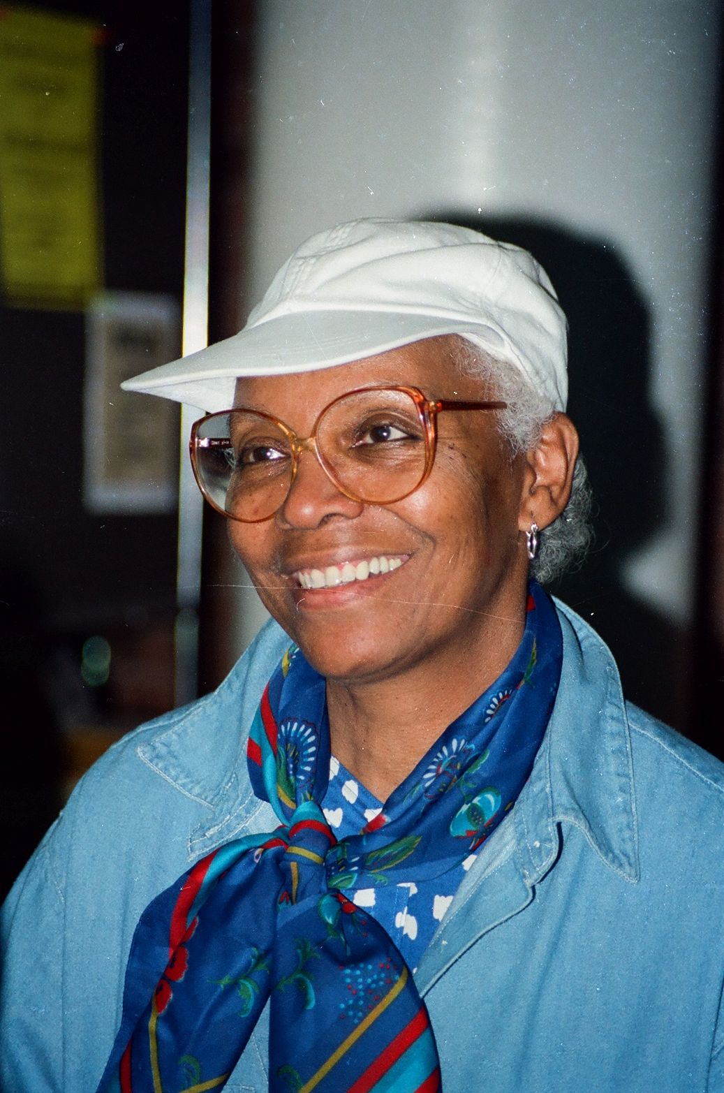 Baltimore M.D. 1996